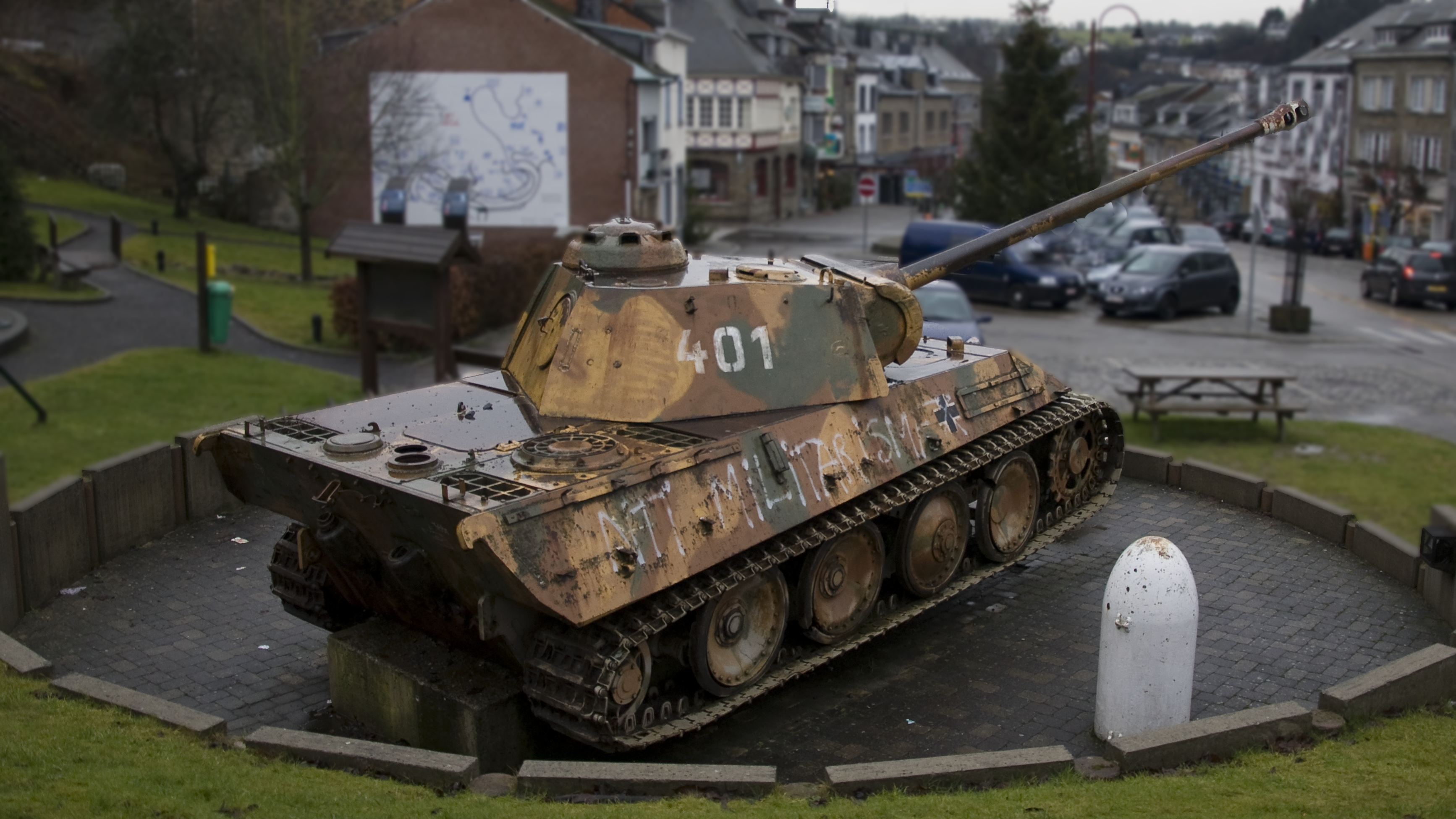 Panzerkampfwagen V Panther te Houffalize, België